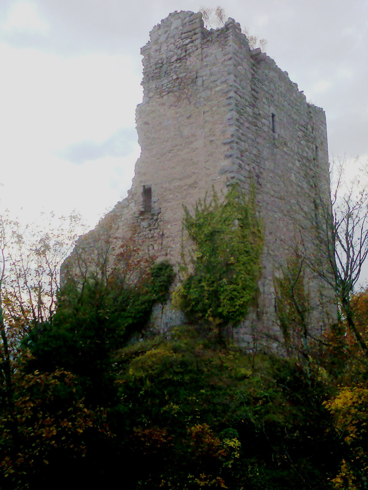 Burgruine Ramstein bei Scherwiller